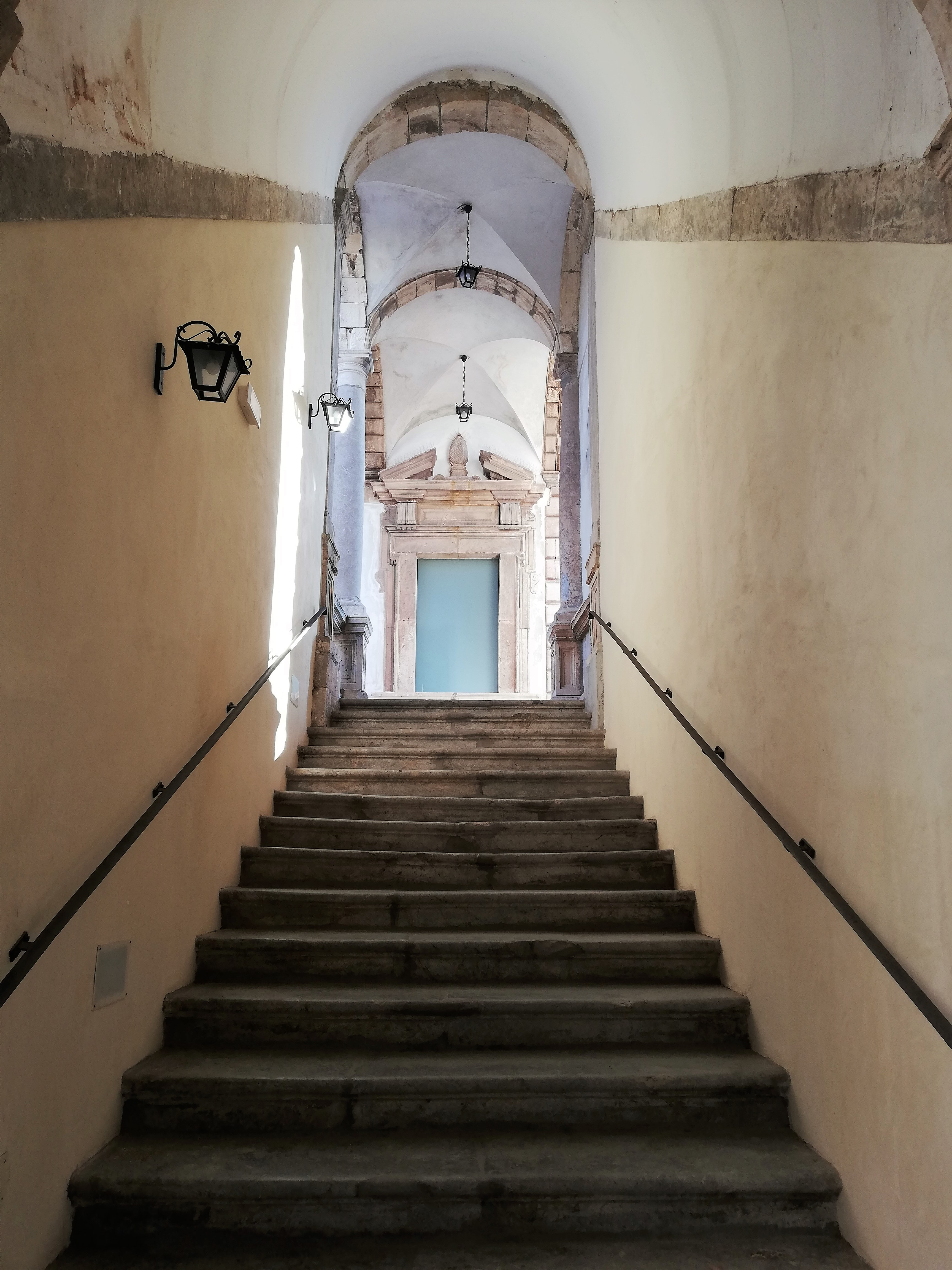 Scalone monumentale.